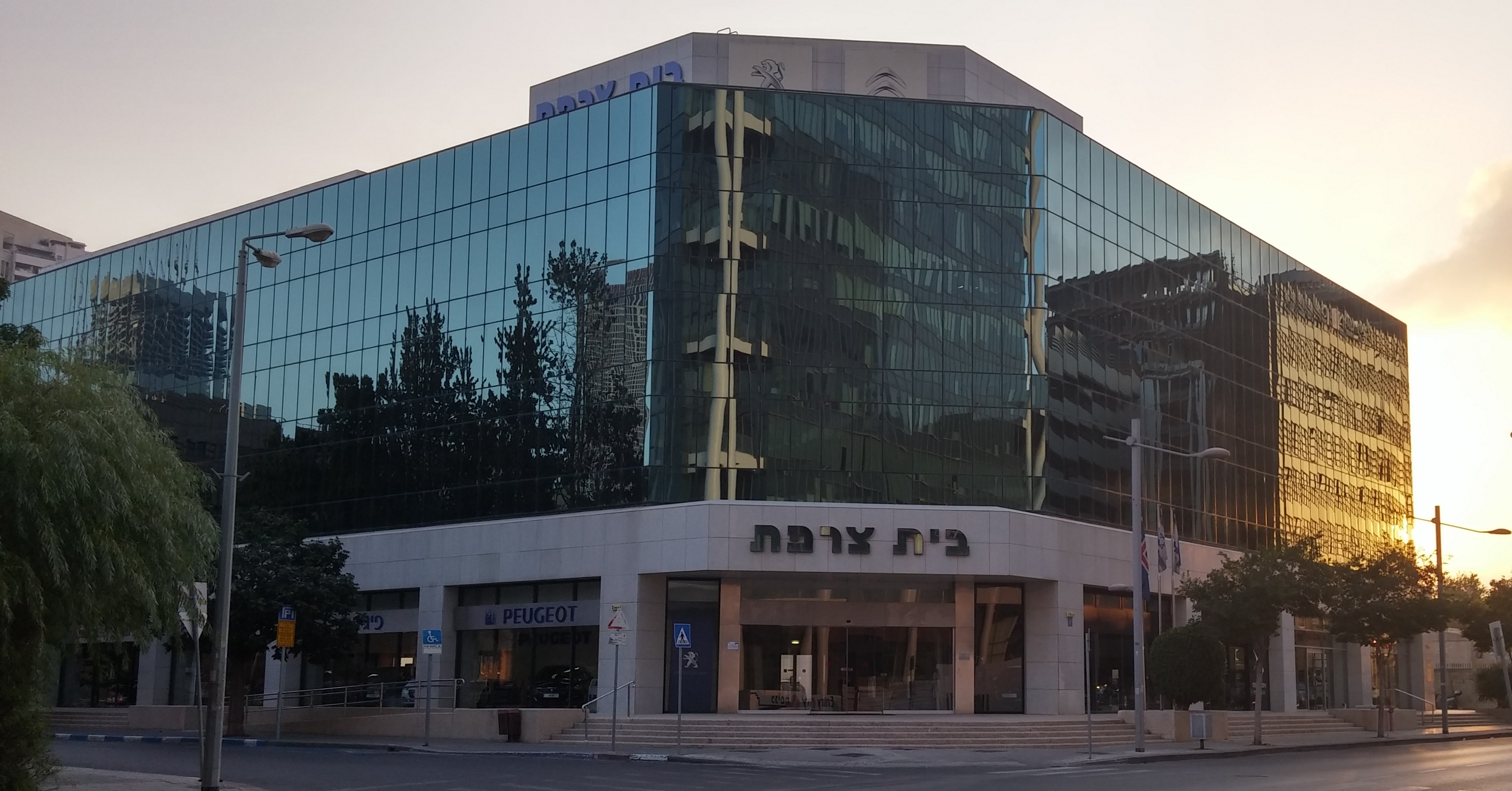 בית צרפת, רחוב תובל, תל אביב